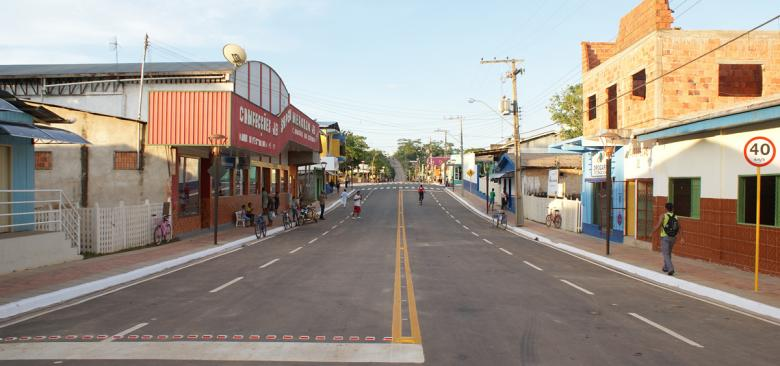 Av.Raimundo Chaar - Assis Brasil - Ac